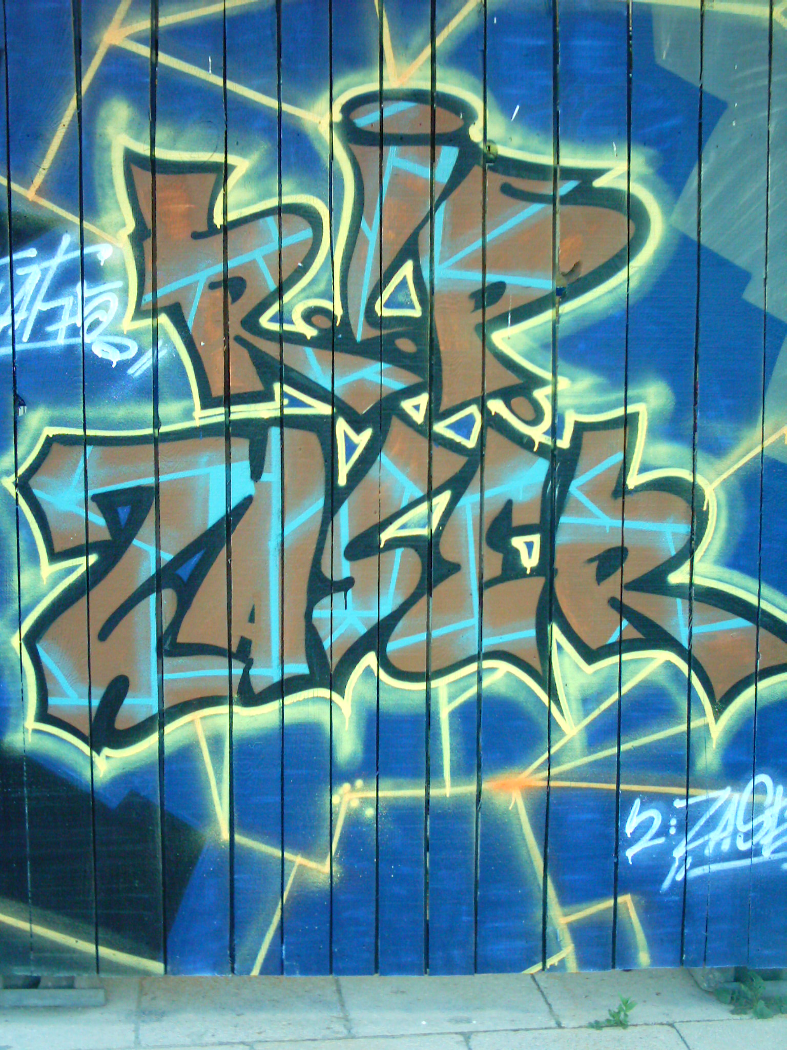 Bauzaun der Umgestaltung am Alexanderplatz (Auswahl) vom 27.06.05